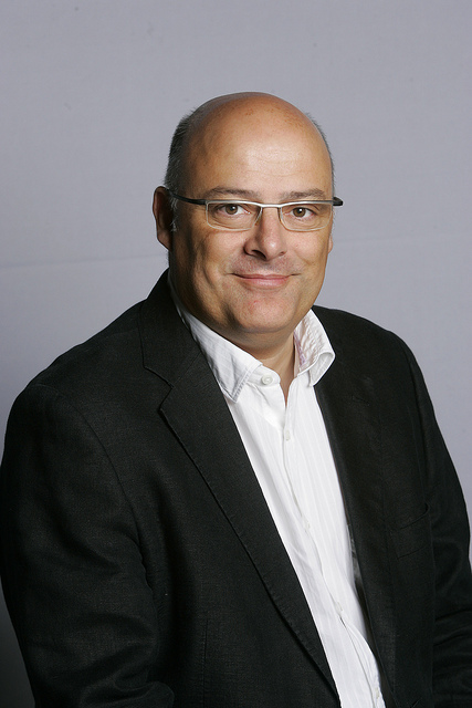 24.07.2010, Lloret de Mar Llistes Parlament Catalunya 2010. Lluís Corominas